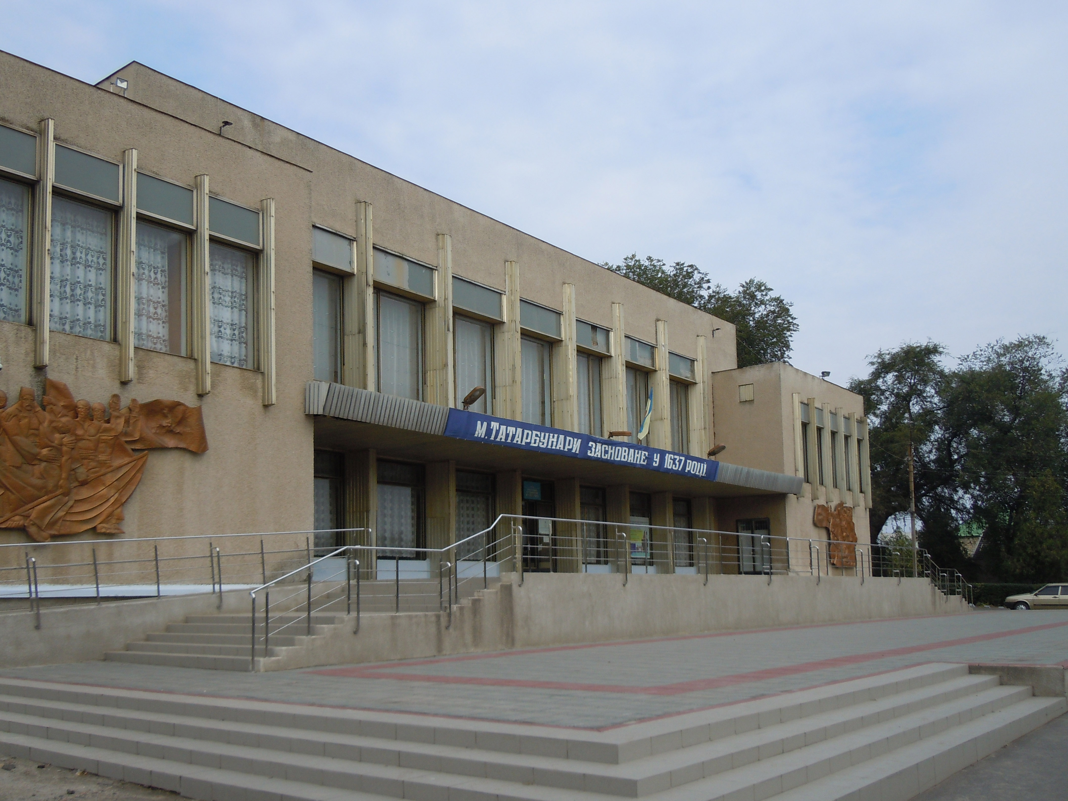 Палац культури Татарбунар